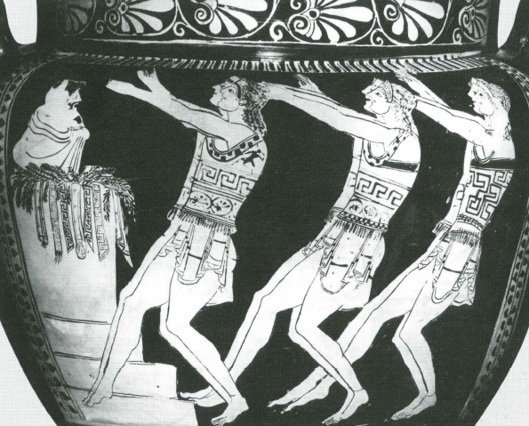 Šest členů sboru vyobrazených na amfoře